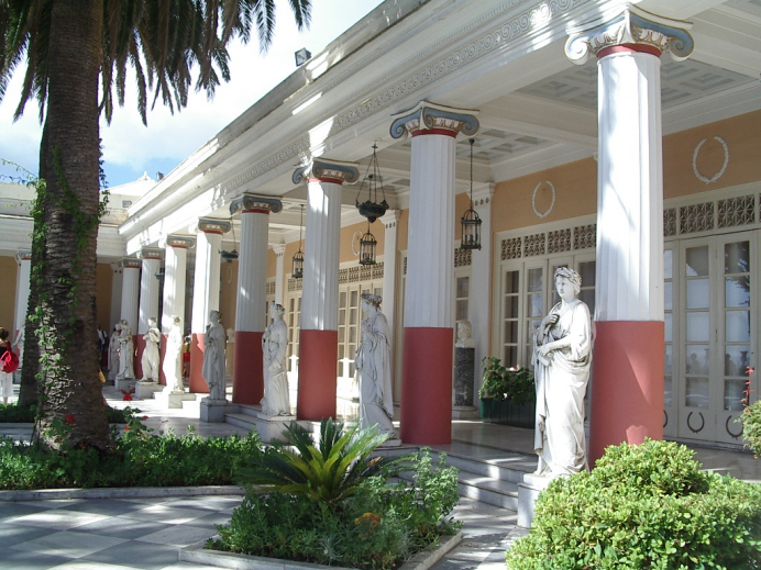 Corfú, palau del Bon repos conegut com palau de Sissi, part posterior, foto propia.